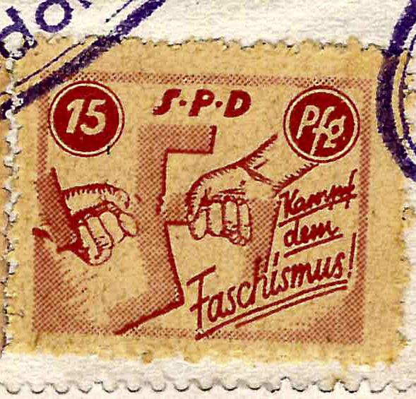 Extrabeitragsmarke „Kampf dem Faschismus“ der Sozialdemokratischen Partei Deutschlands (SPD) für das Parteibuch (hier: abgestempelte Beitragsmarke des Versicherungskaufmanns Konrad Hanslin [1890-1969])